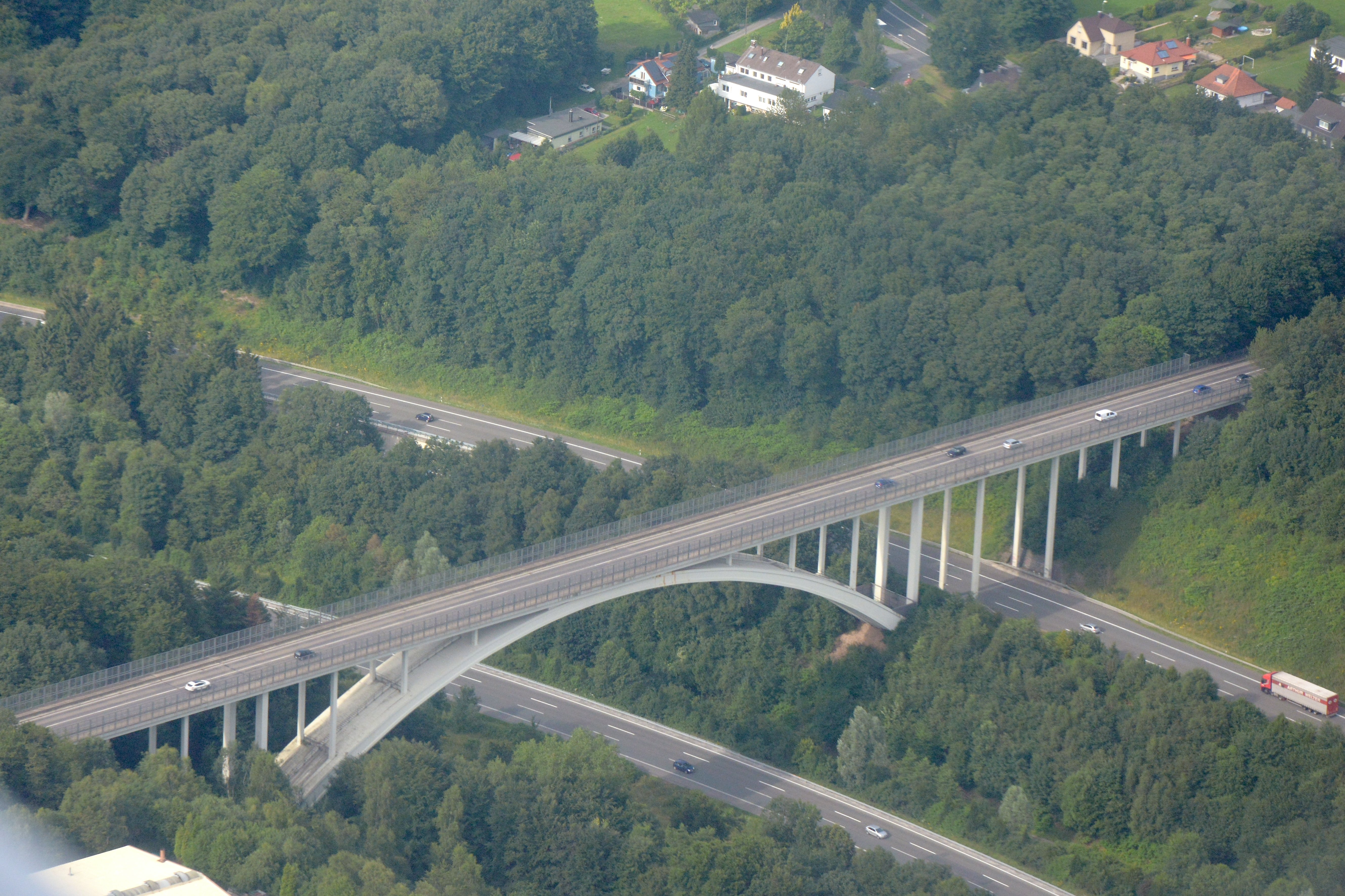 Blombachtalbrücke in Nordrhein-Westfalen